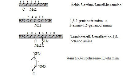 Nomenclatura de Aminas